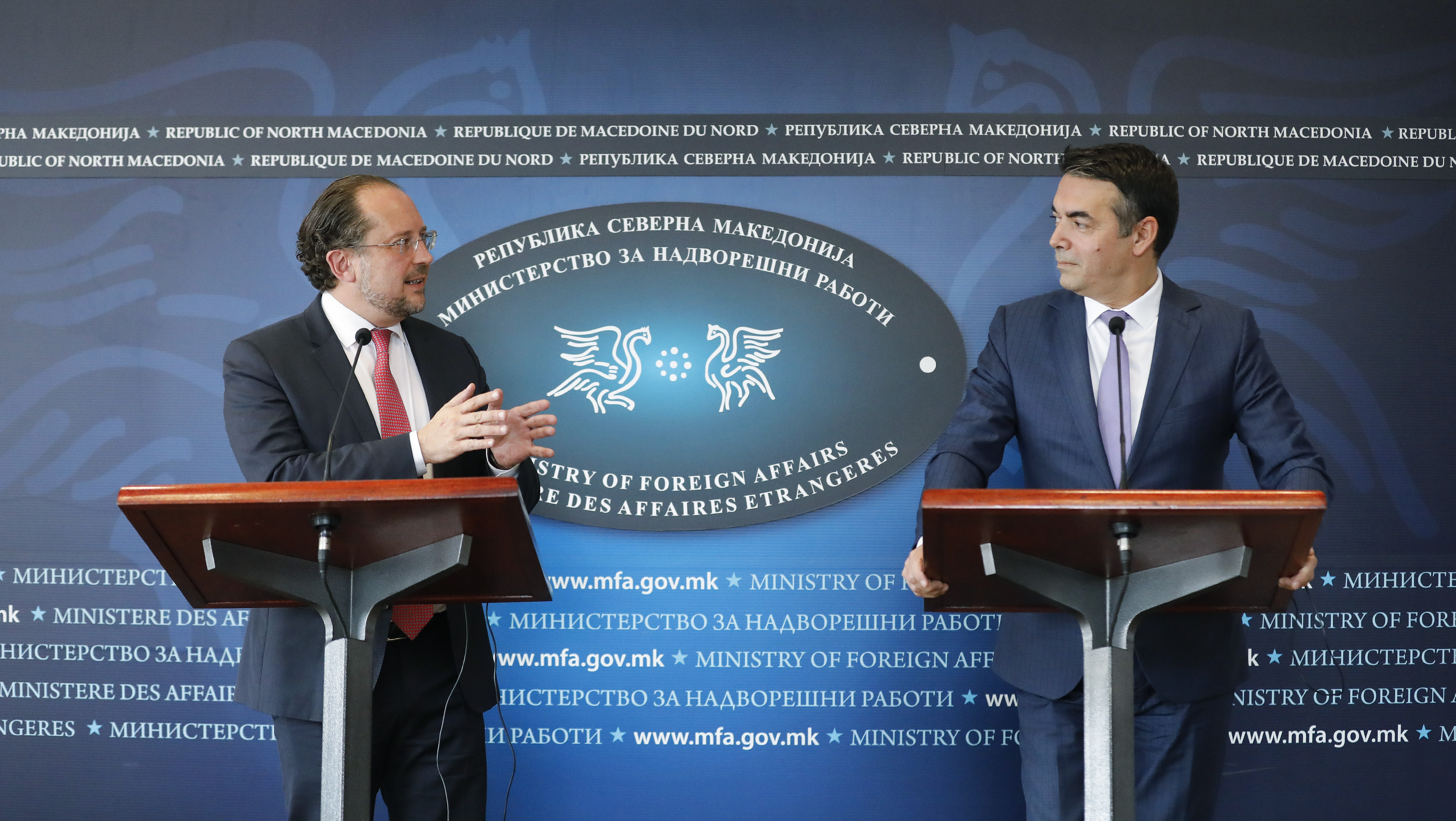 _B6A9261